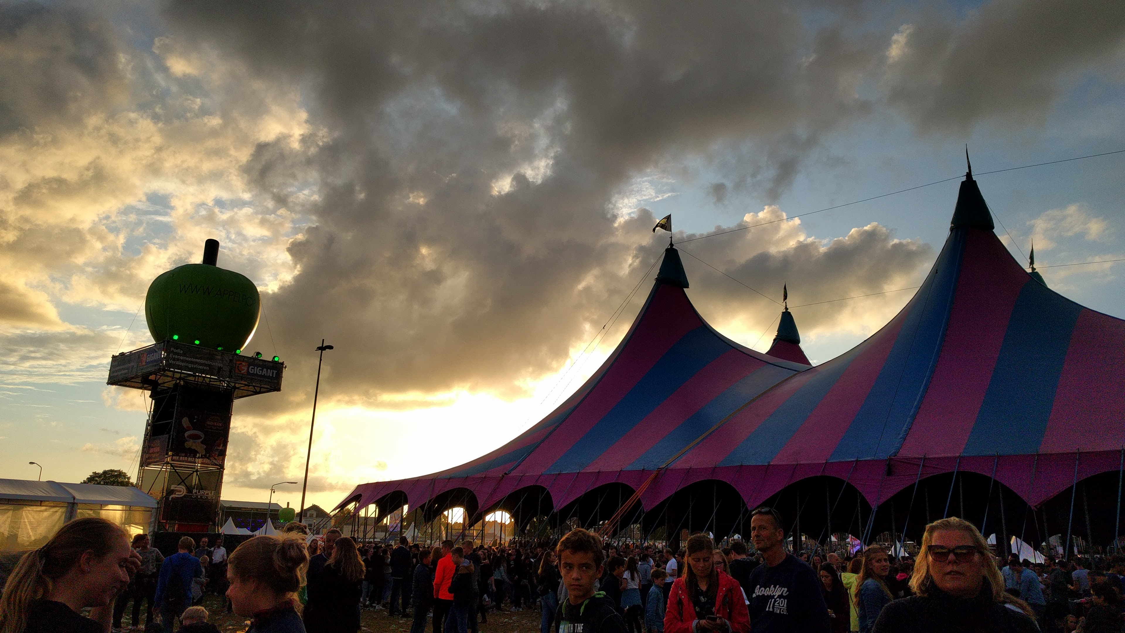 De grote tent van Appelpop